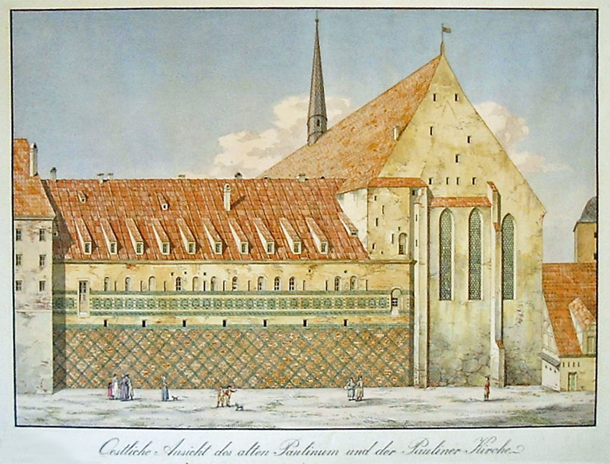 Die Paulinerkirche mit dem alten Paulinerkolleg vor 1830, Gebäude noch vom ehemaligen Dominikanerkloster (Aquarell auf Federzeichnung)